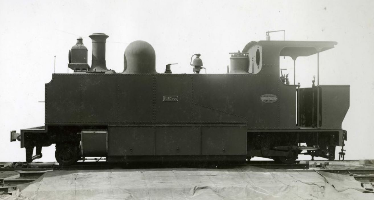 Tubize 1521 de 1907 pour le Fayoum Light Railway (FLR n° 22). Photographie d’usine, coll. Musée ‘de la Porte’ à Tubize jpg